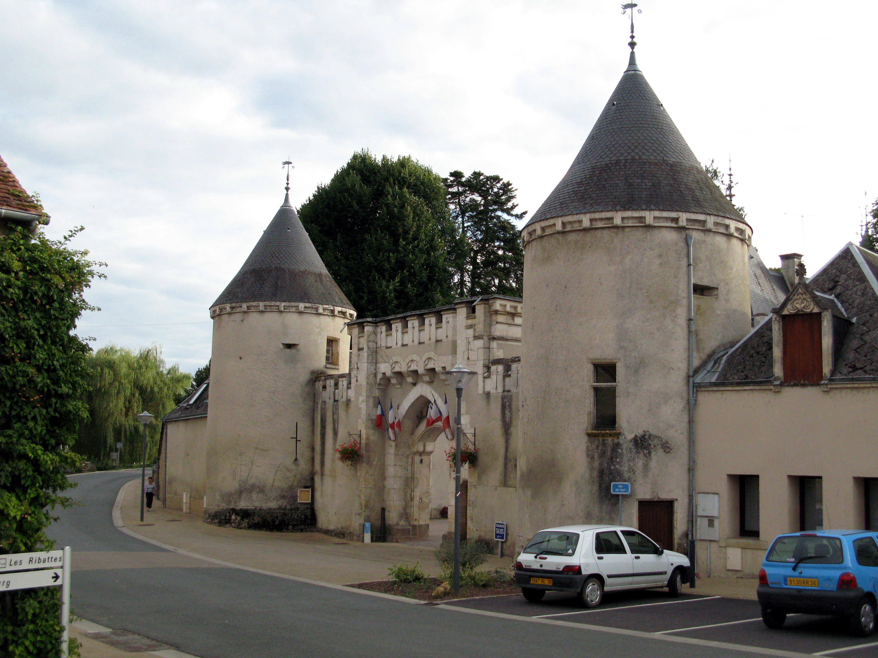 Montgivray (Indre, France) - La mairie actuelle est installée dans le château néo-gothique. . .